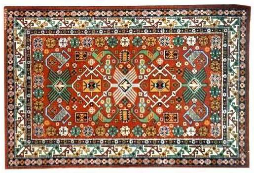 XIX əsrin əvvəlinə aid "Yeni Bico" xalçası; indiki Ağsu rayonunun i.ə.v. daxil olan Bico kəndinə aiddir.